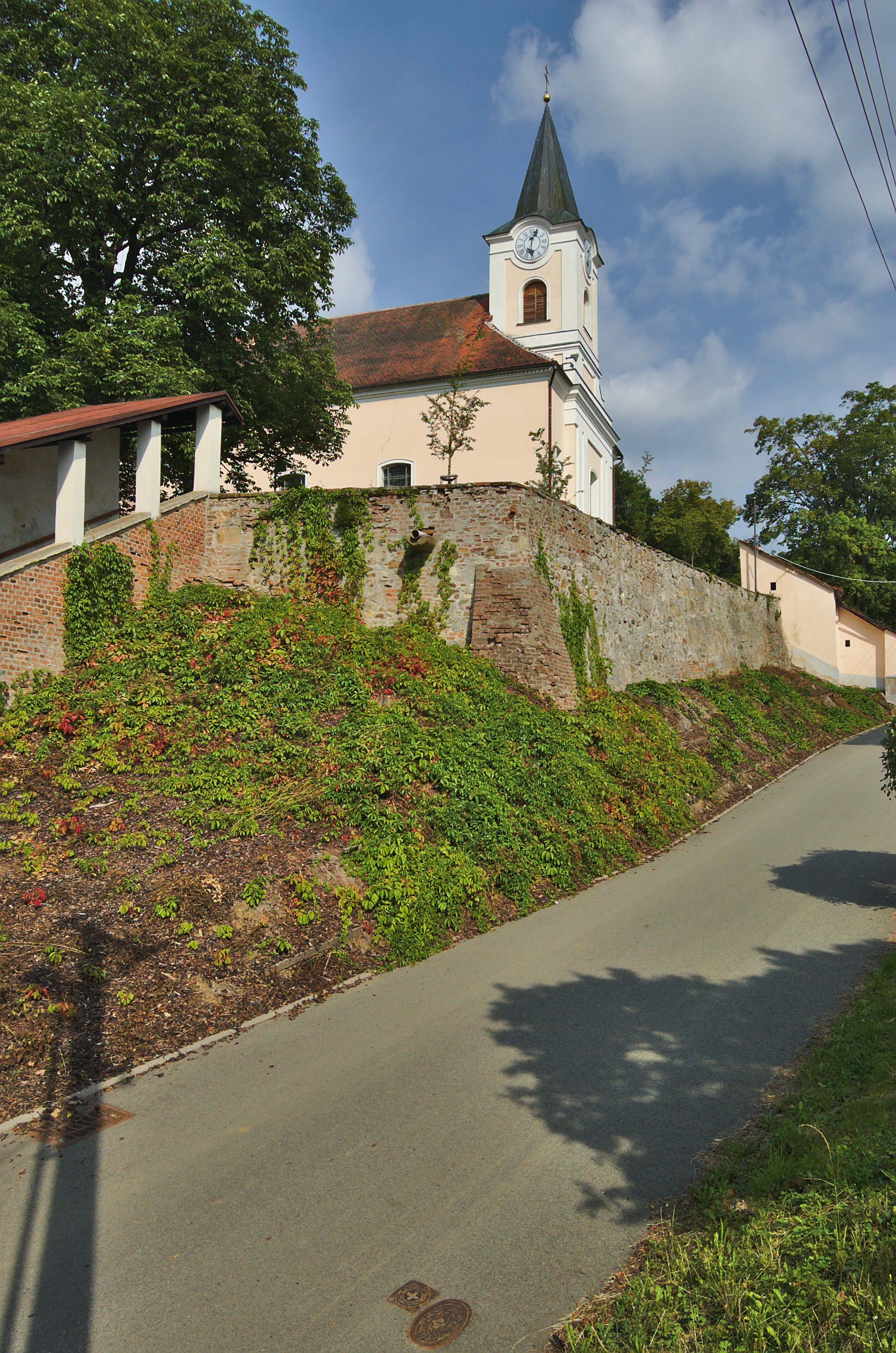 Kostel svatého Marka, Knínice u Boskovic, okres Blansko